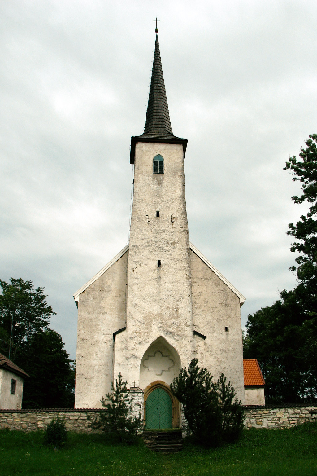 Järva-Madise kirik